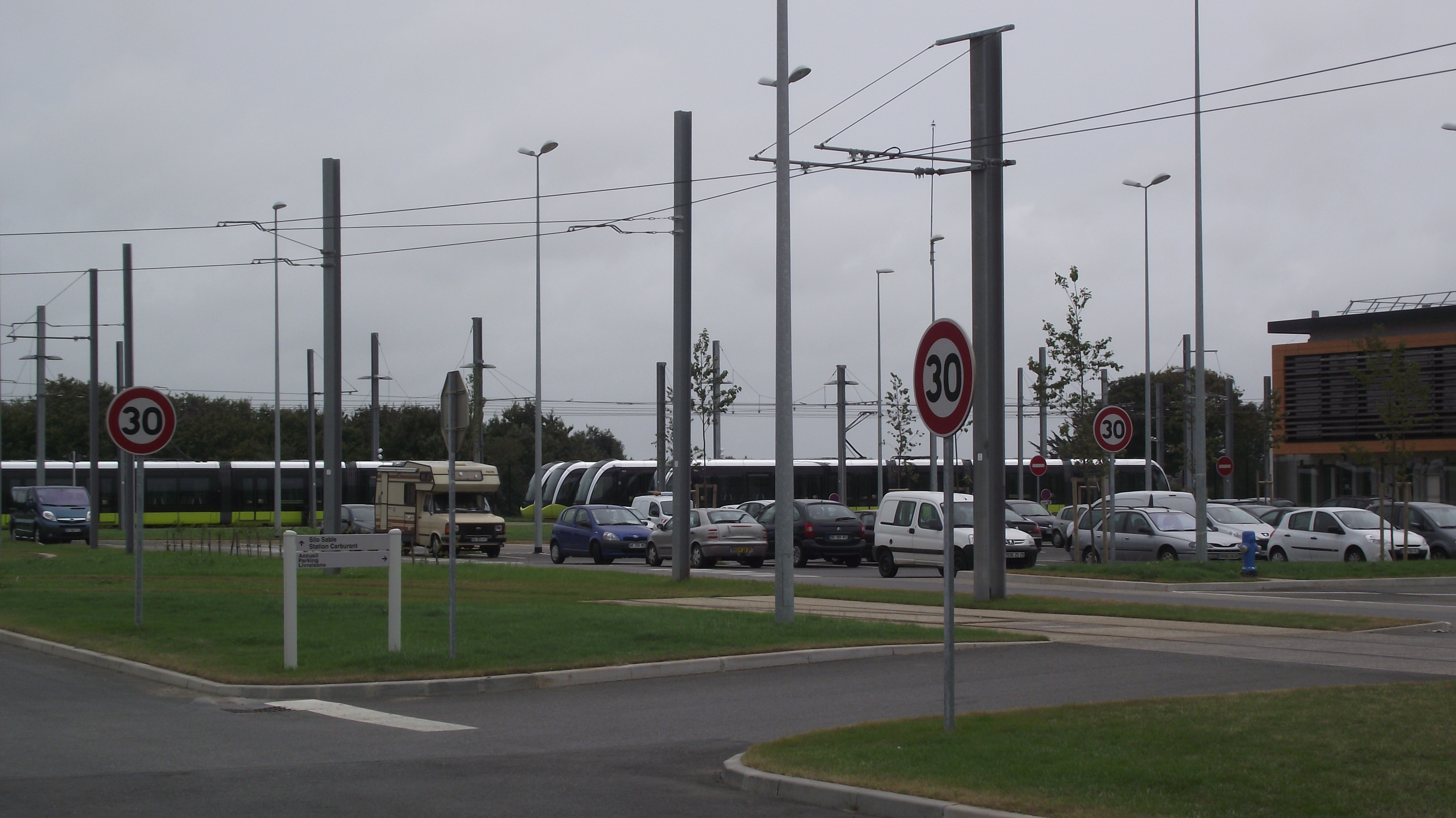 Tram stelplaats van Brest